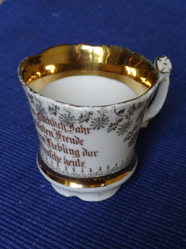 Geburtstagstasse der Firma Tielsch in Altwasser. Beschaffungszeitraum vermutlich ca. 1900